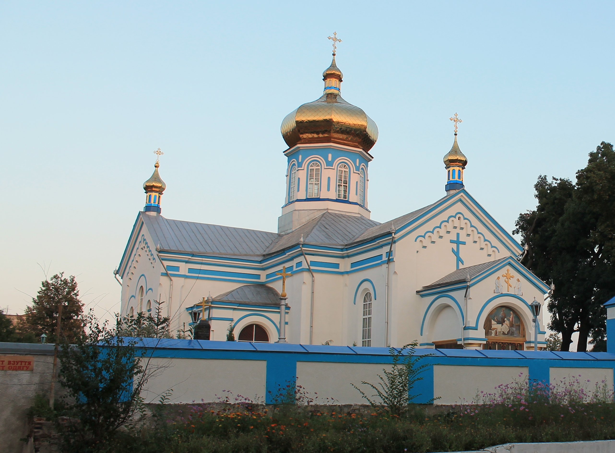 Різдво-Богородицька церква (мур.), Славута, вул. Мануїльського